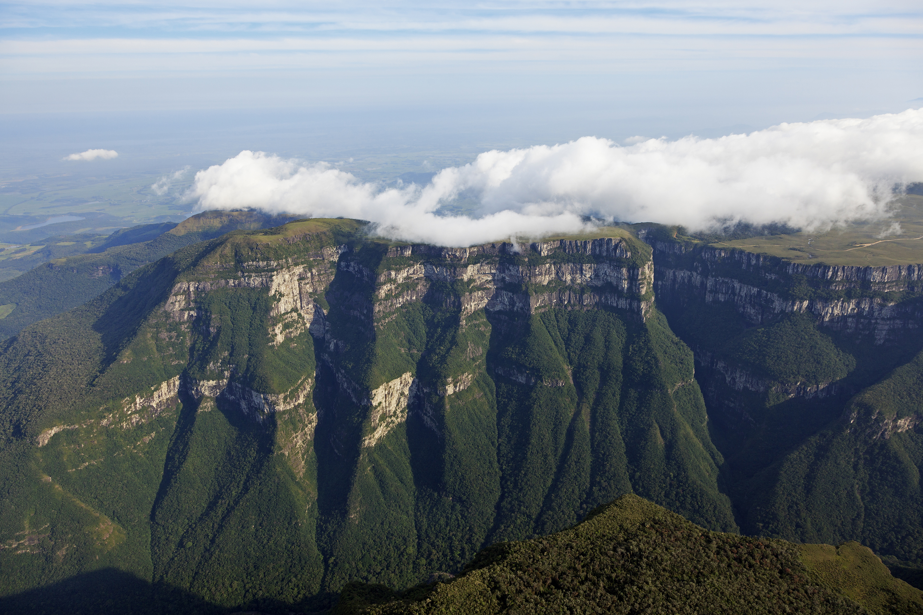 Foto aérea do Canyon Fortaleza